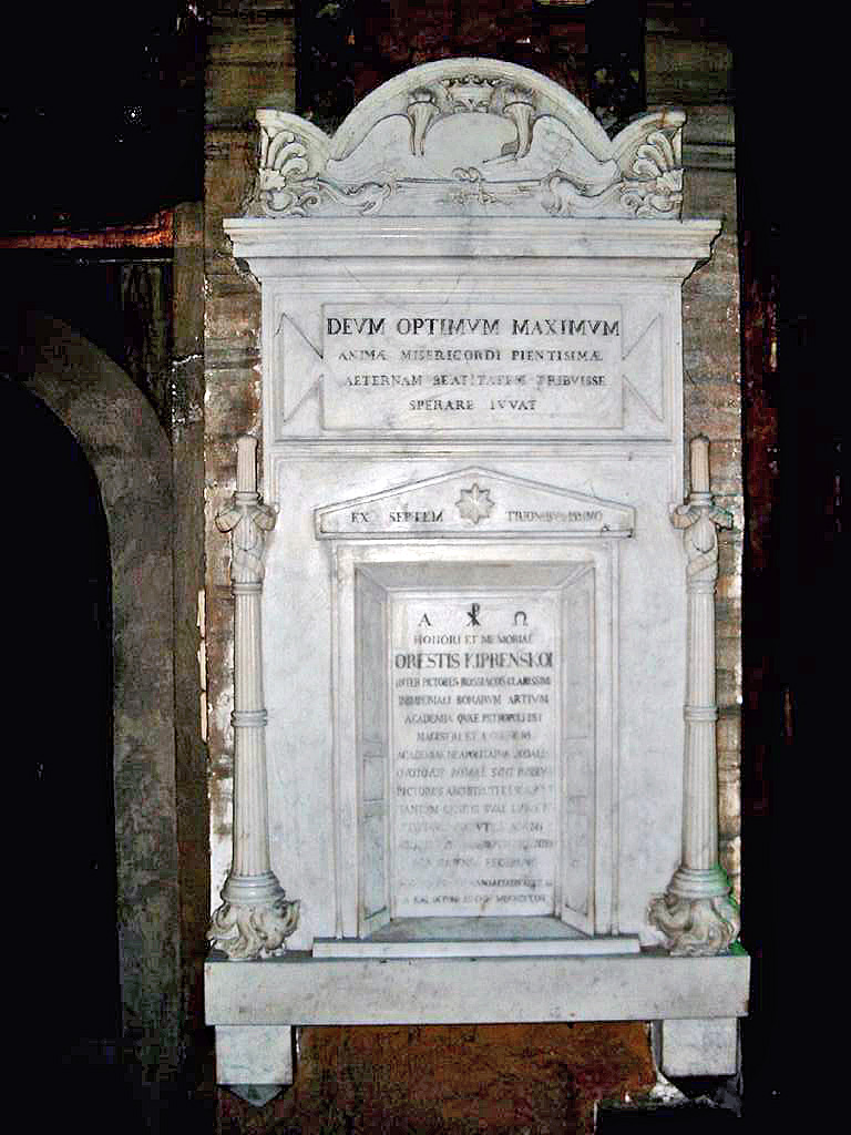 Deitsch: MAGINON DIGITAL CAMERA